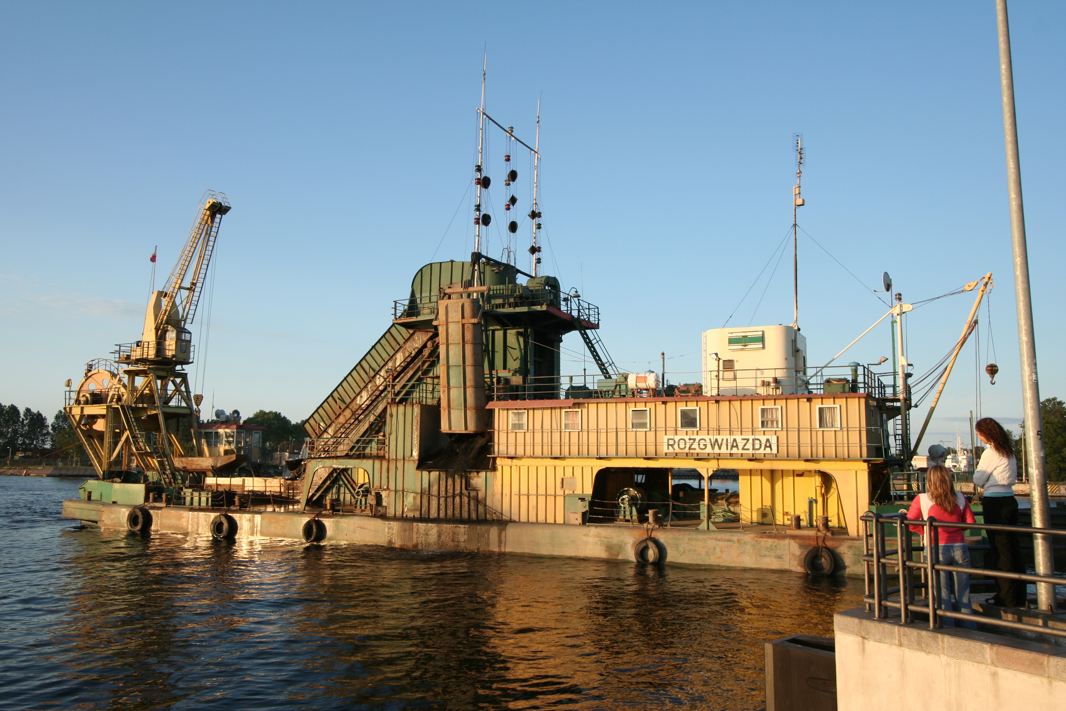 Pogłębiarka Rozgwiazda należąca do PRCiP podczas prac pogłębiarskich przy Nabrzeżu Ziółkowskiego w Porcie Gdańsk - czerwiec 2006 r. W wypadku, do którego doszło 17 października 2008 r. rano ok. 7 mil morskich od brzegu na wysokości wsi Gąski (Zachodniopomorskie) pogłębiarka Rozgwiazda zatonęła w trakcie holowania przez holownik z Gdańska do Świnoujścia. Zginęło 5 członków załogi pogłębiarki.